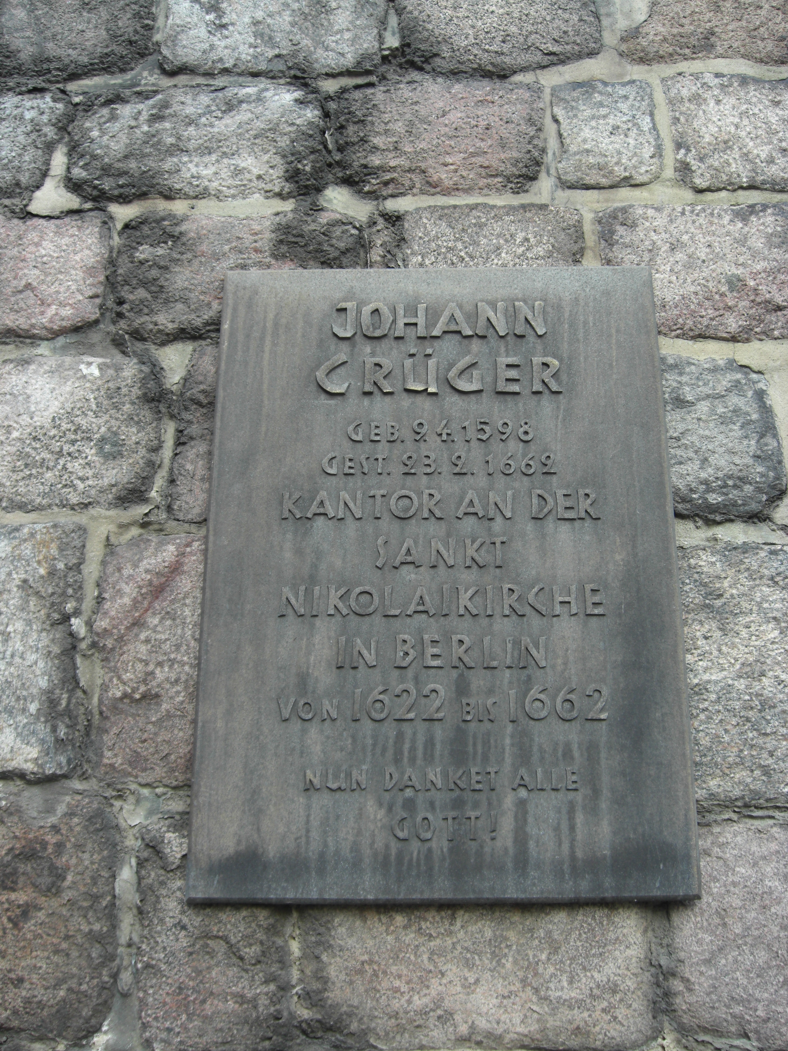 Gedenktafel für Johann Crüger (1598-1662), Komponist von Kirchenliedern; Sankt Nikolaikirche, Berlin-Mitte